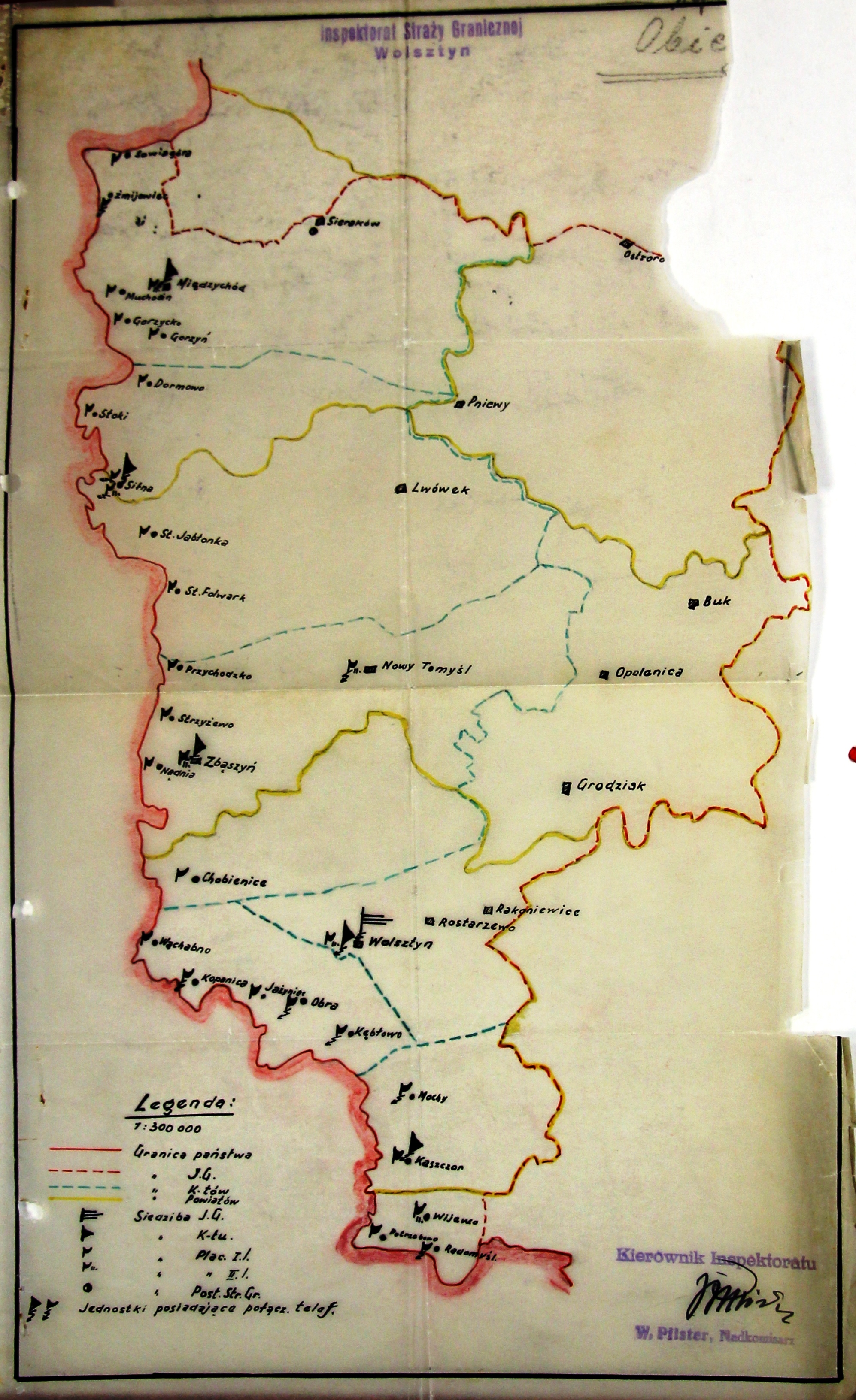 Szkic Inspektoratu Granicznego Wolsztyn - lata 30. XX wieku